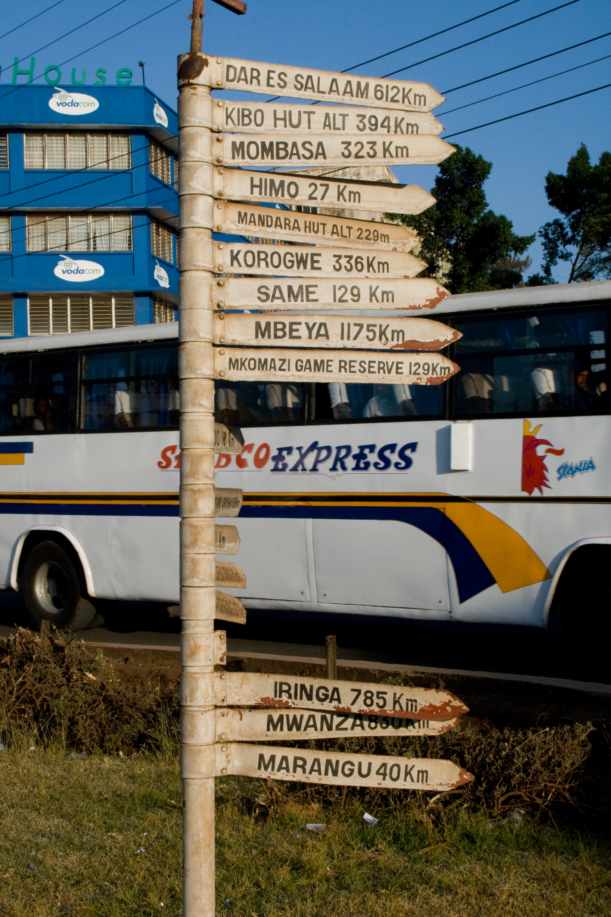 Crossroad in Moshi, Tanzania.